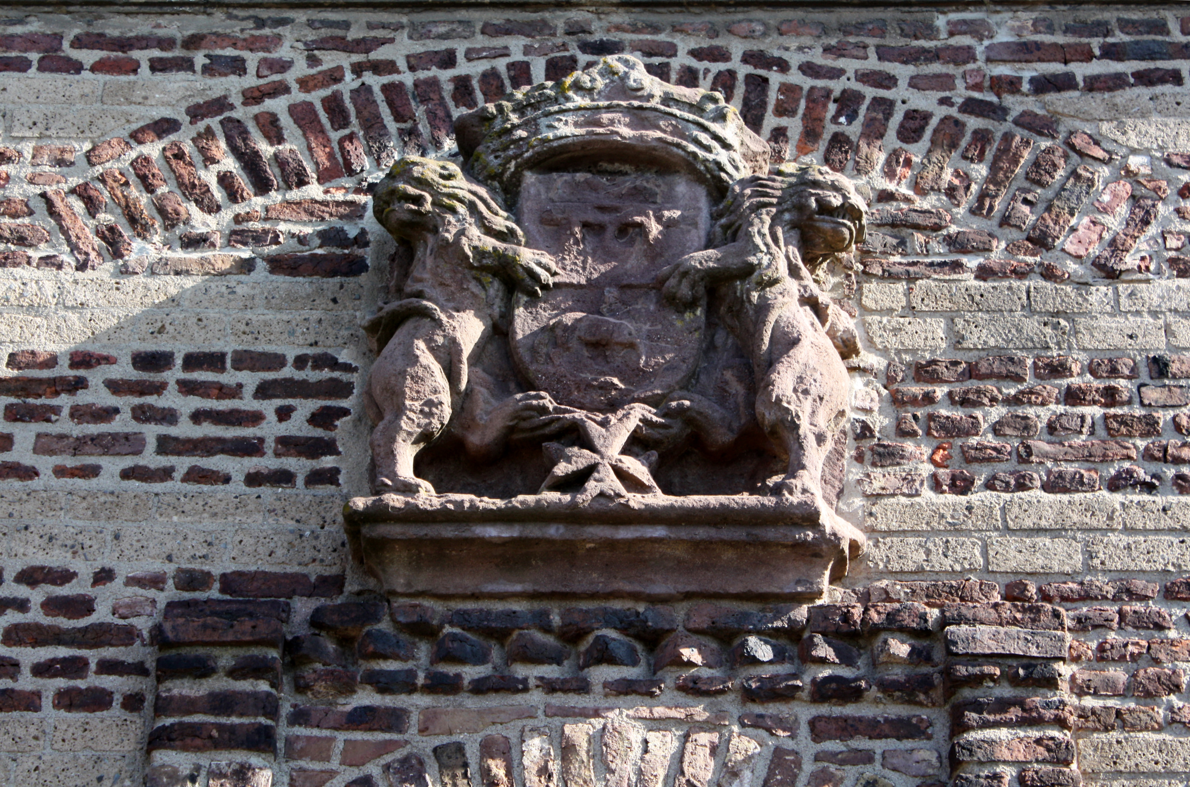 Erftstadt-Liblar, Pfarrkirche St. Alban. Wappen der Familie Wolf Metternich